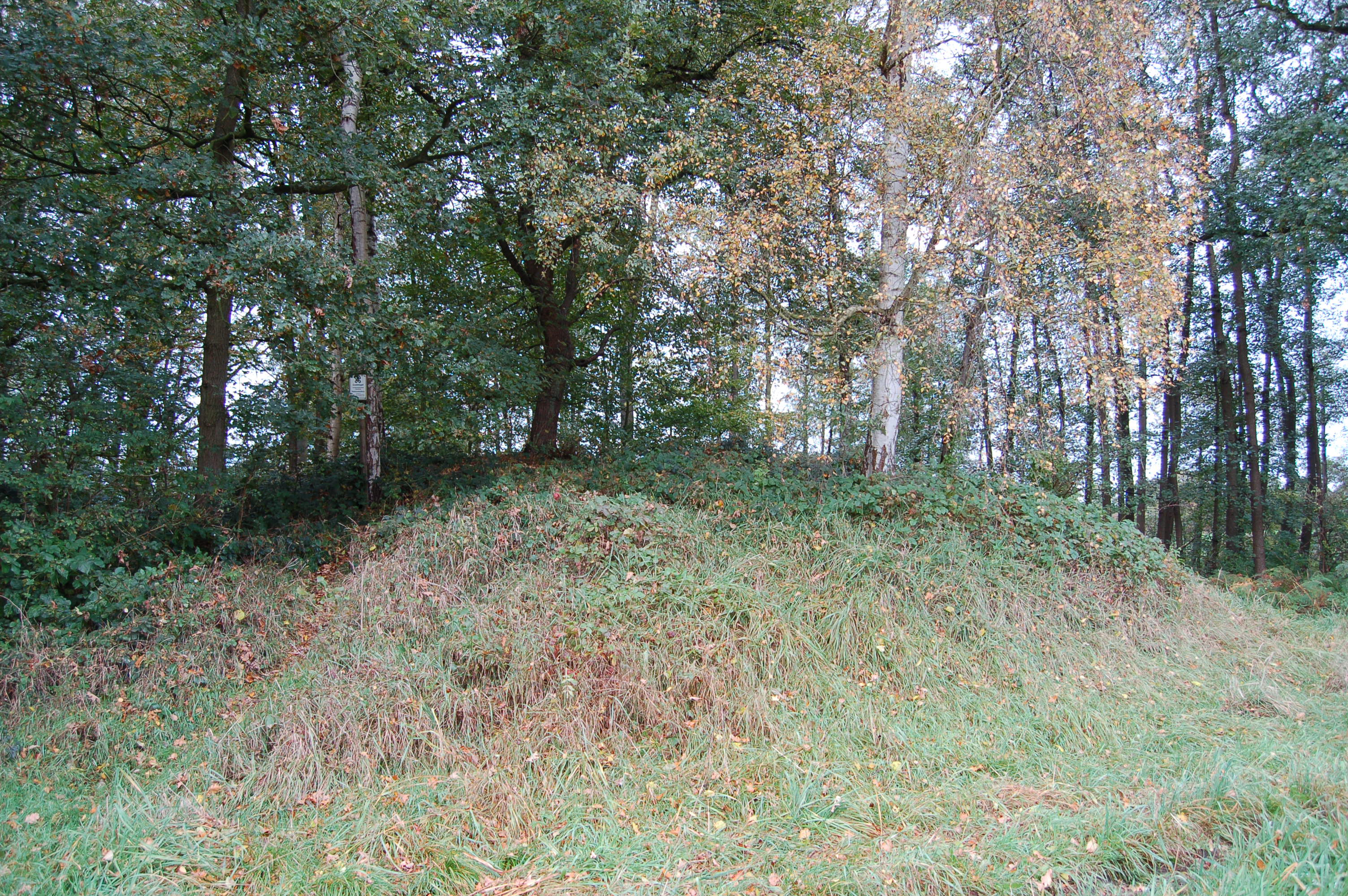 Das Hügelgrab in Appen, Kreis Pinneberg